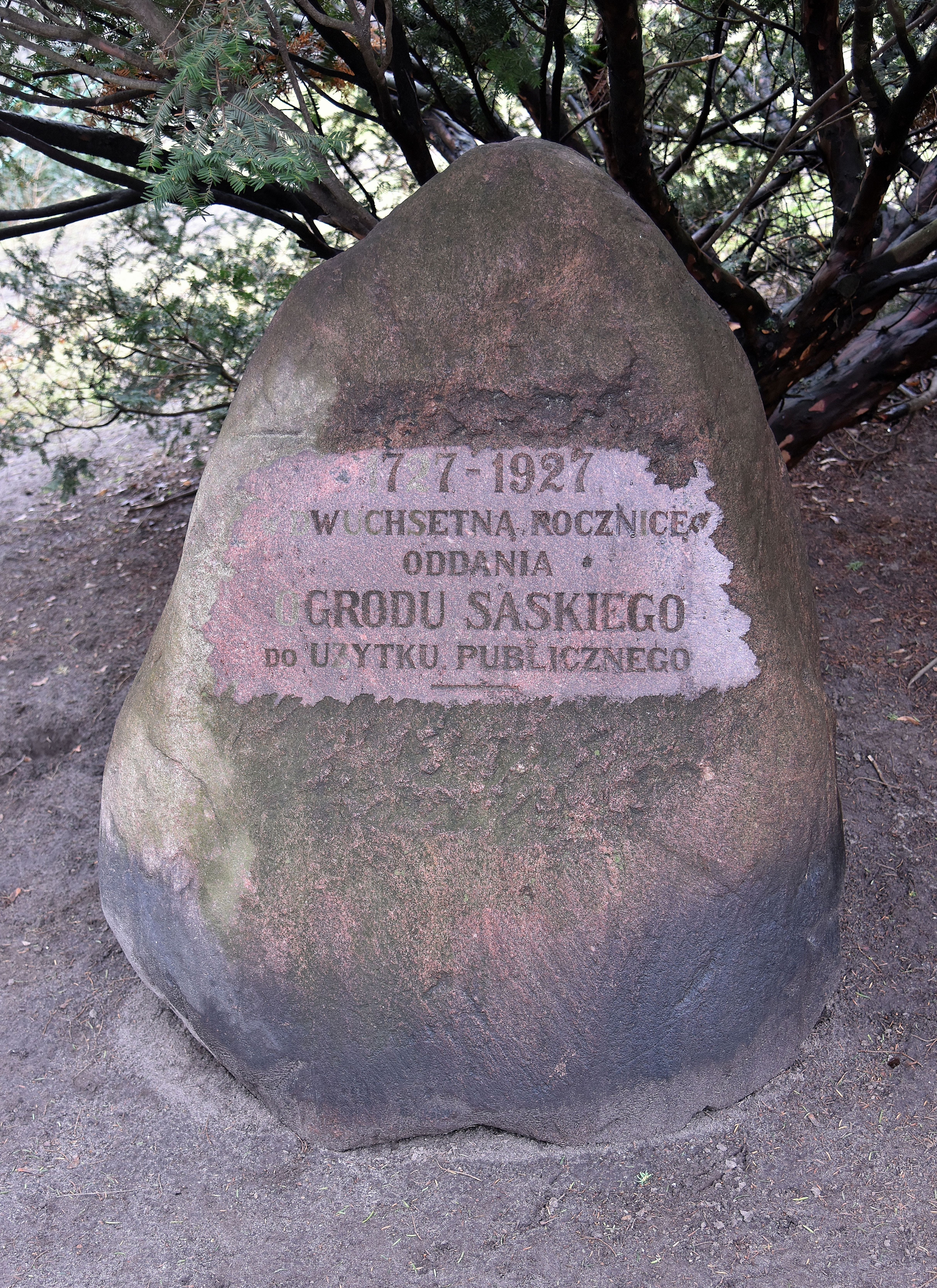 Kamień upamiętniający 200-lecie udostępnienia Ogrodu Saskiego publiczności w pobliżu wodozbioru